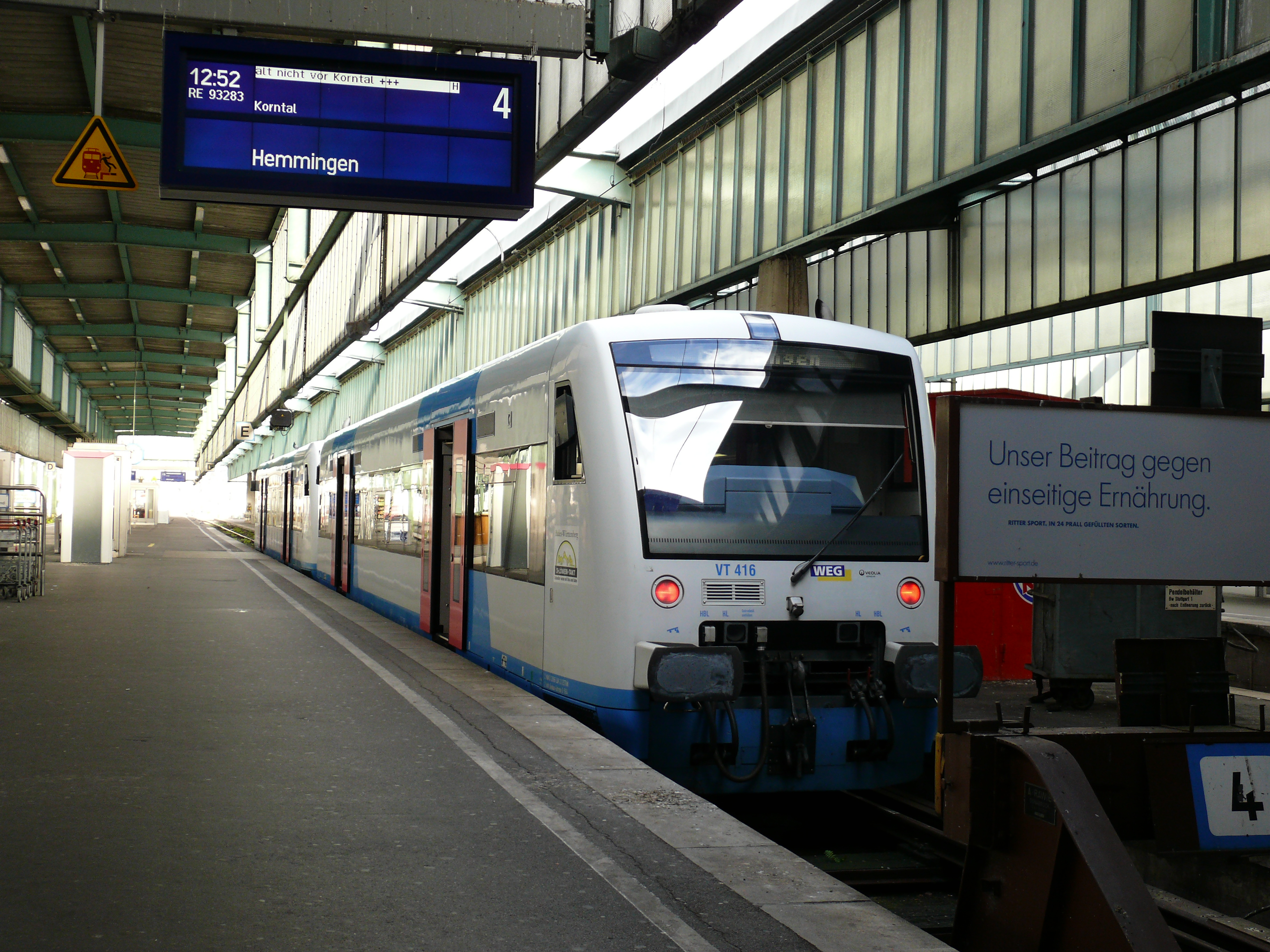 Eine RS1-Doppeltraktion der Strohgäubahn am Stuttgarter Hauptbahnhof. An den Adventssamstagen im Jahr 2011 wurden einige Züge der Strohgäubahn bis Stuttgart durchgebunden.